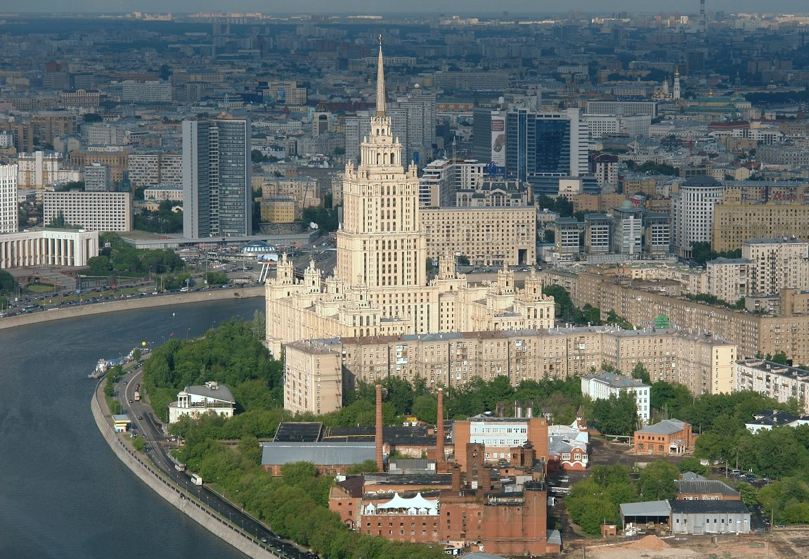 Гостиница Украина в Москве.